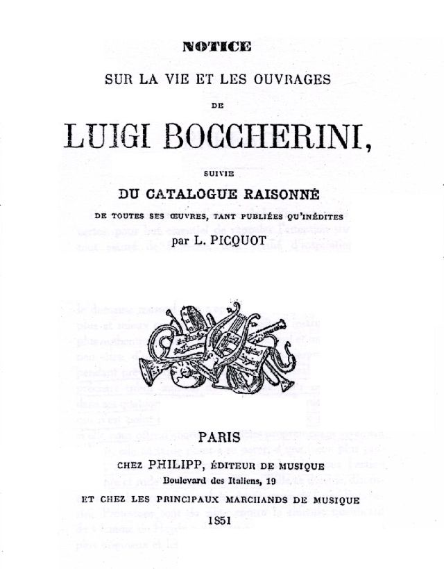 Page de titre de Louis Picquot, Notice sur la vie et les ouvrages de Luigi Boccherini, suivie du catalogue raisonné de toutes ses œuvres, tant publiées qu'inédites, Paris, chez Philipp (=Camille Prilipp), 1851.